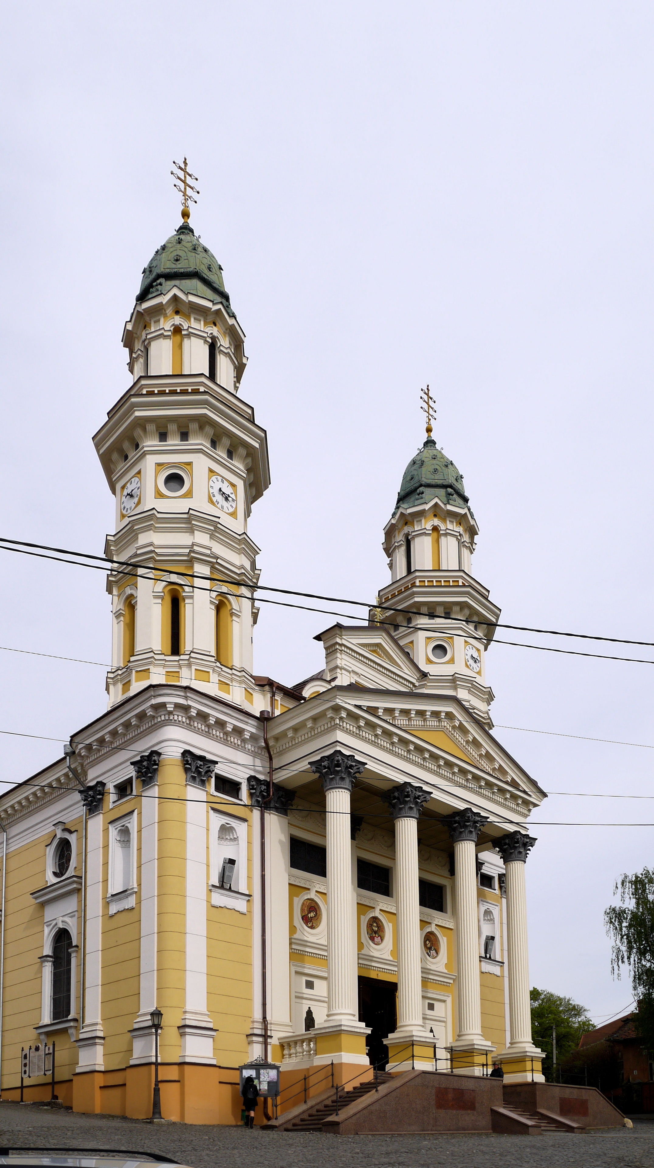 Здвиженський кафедральний собор, Ужгород, вул. Капітульна, 9